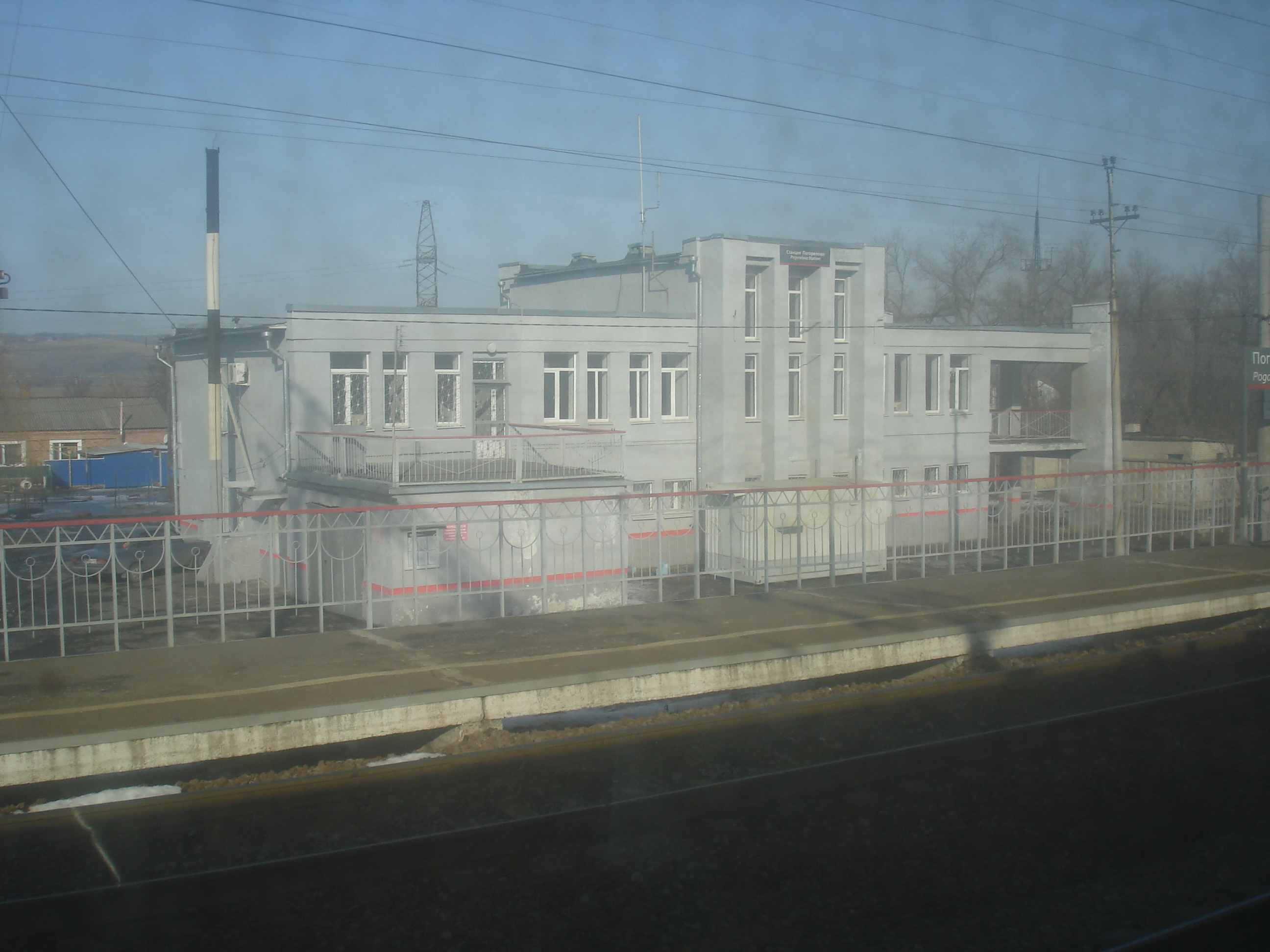 Северо-Кавказская железная дорога, станция Погорелово.